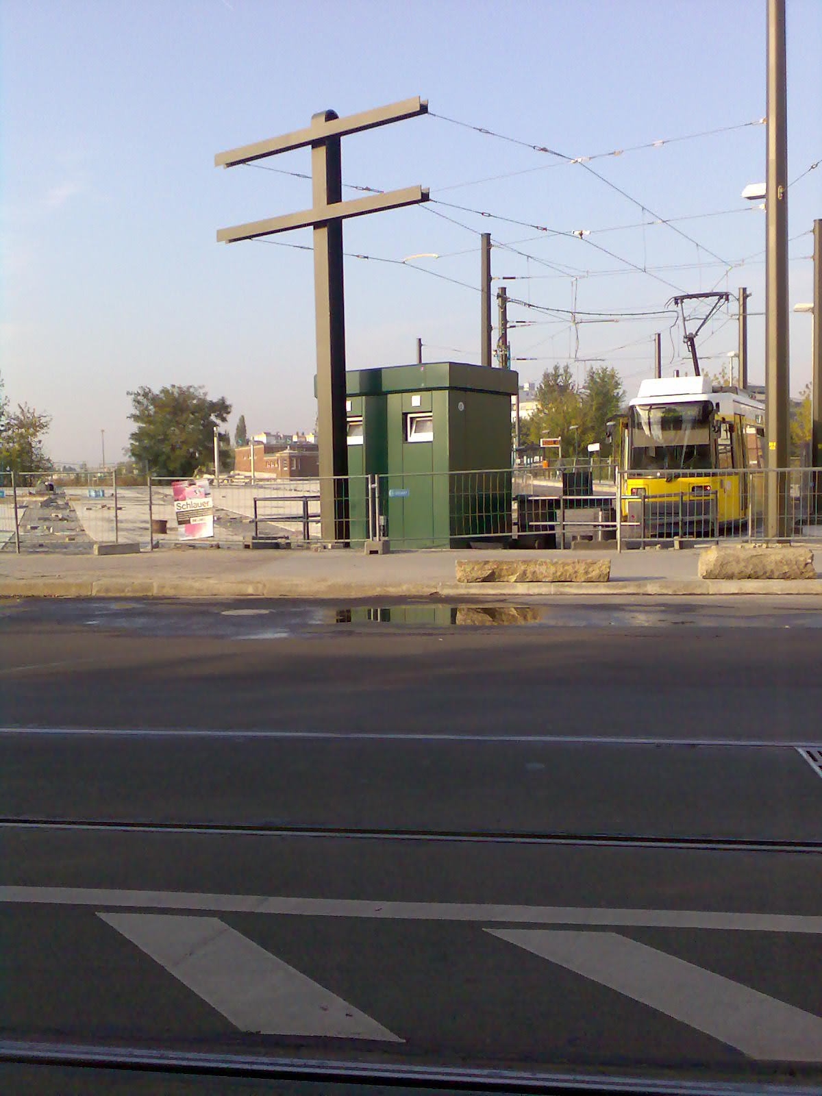 Invalidenstraße Berlin-Mitte